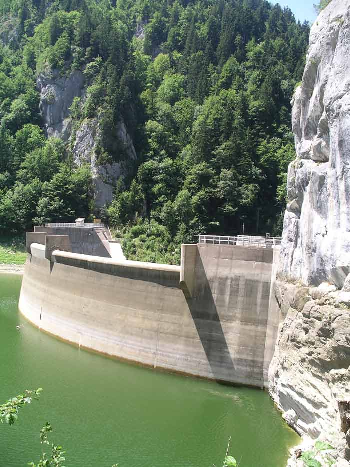 Le lac de Moron, à la frontière entre la France et la Suisse